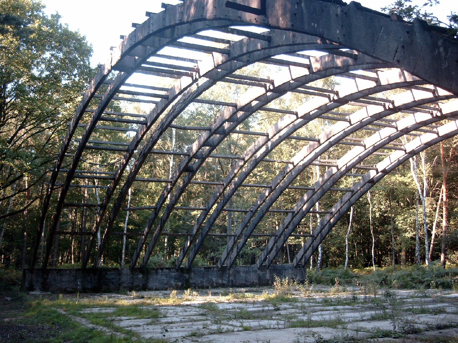 Rundbogenhalle Fliegerhorst Venlo-Herongen/Nordkomplex, Straelen, Deutschland; freigelegt im Jahr 2003/2004 durch den Förderverein This is a photograph of an architectural monument.